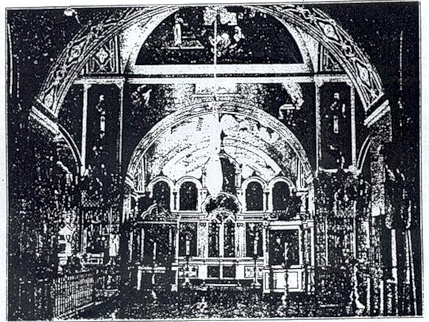 Внутренний вид главного храма во имя святителя Николая. Ключегорский Казанско-Богородицкого монастырь, Бузулукский уезд Самарской губернии